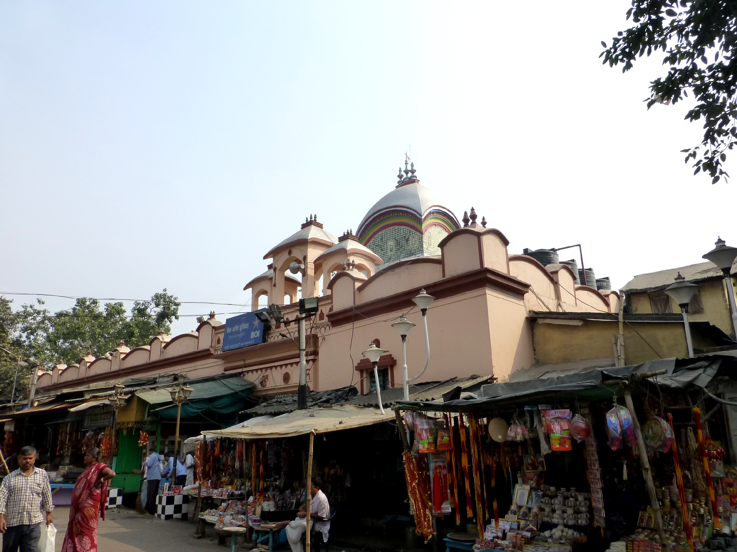 Kalighat Temple Kolkata India